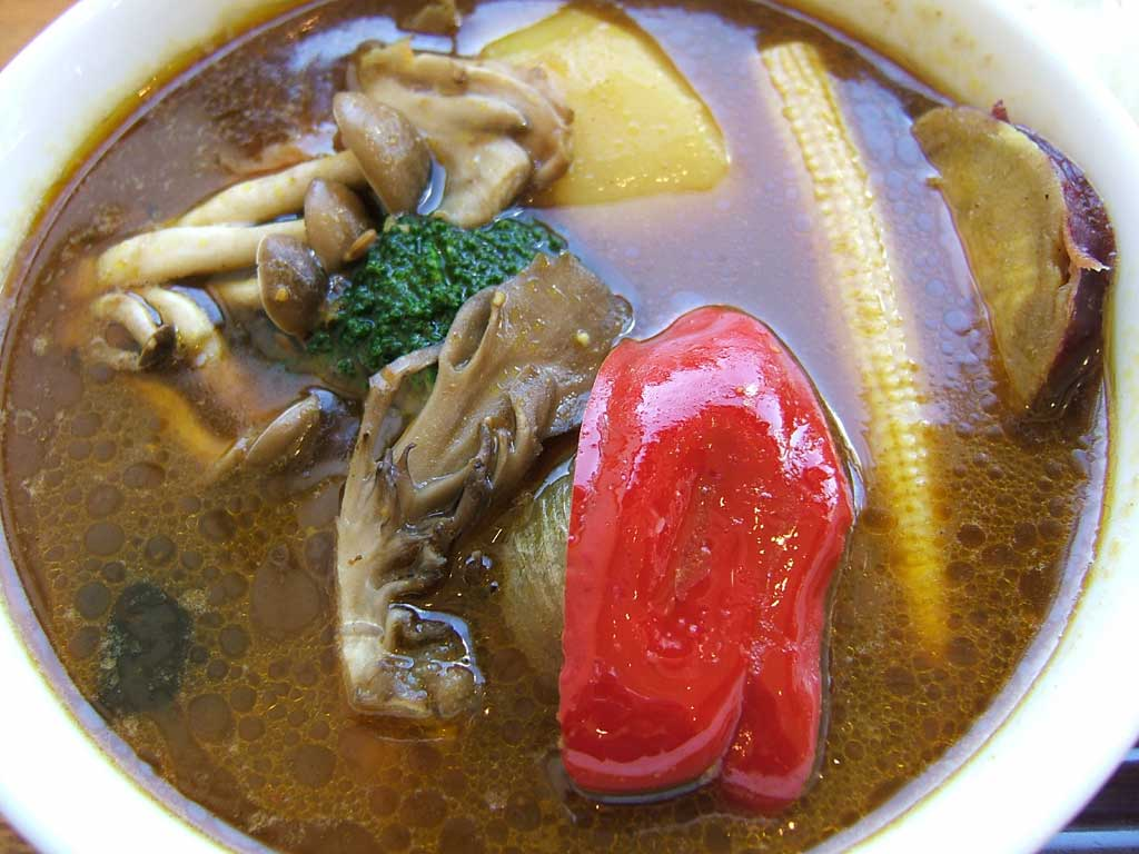 Soup Curry in Hareruya - Kutchan, Hokkaido